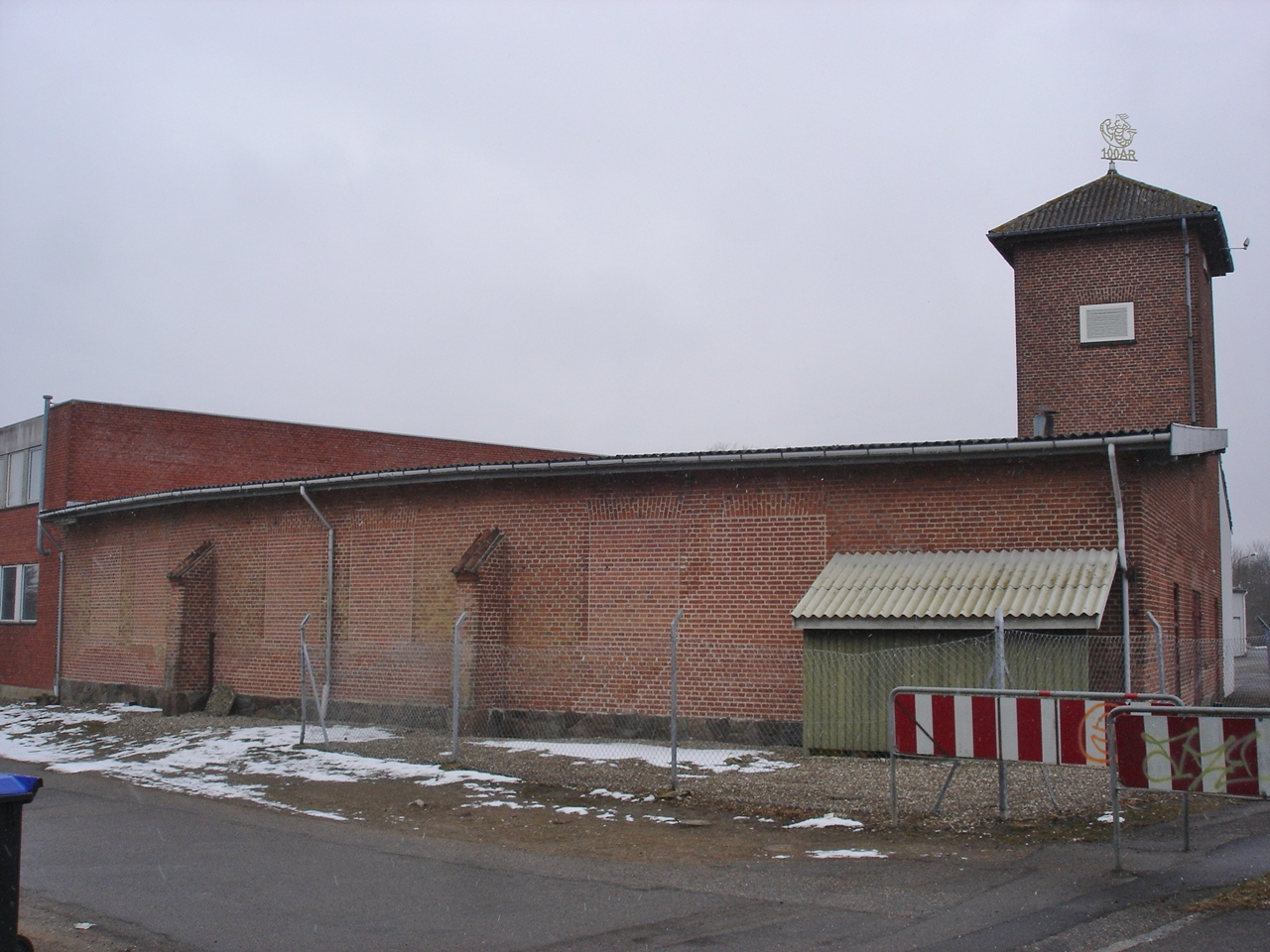 Hørve-Værslev Jernbanes remise i Hørve. Fiskekonservesfabrikken Lykkeberg har haft produktion her siden 1958 og udvidet bygningen meget.